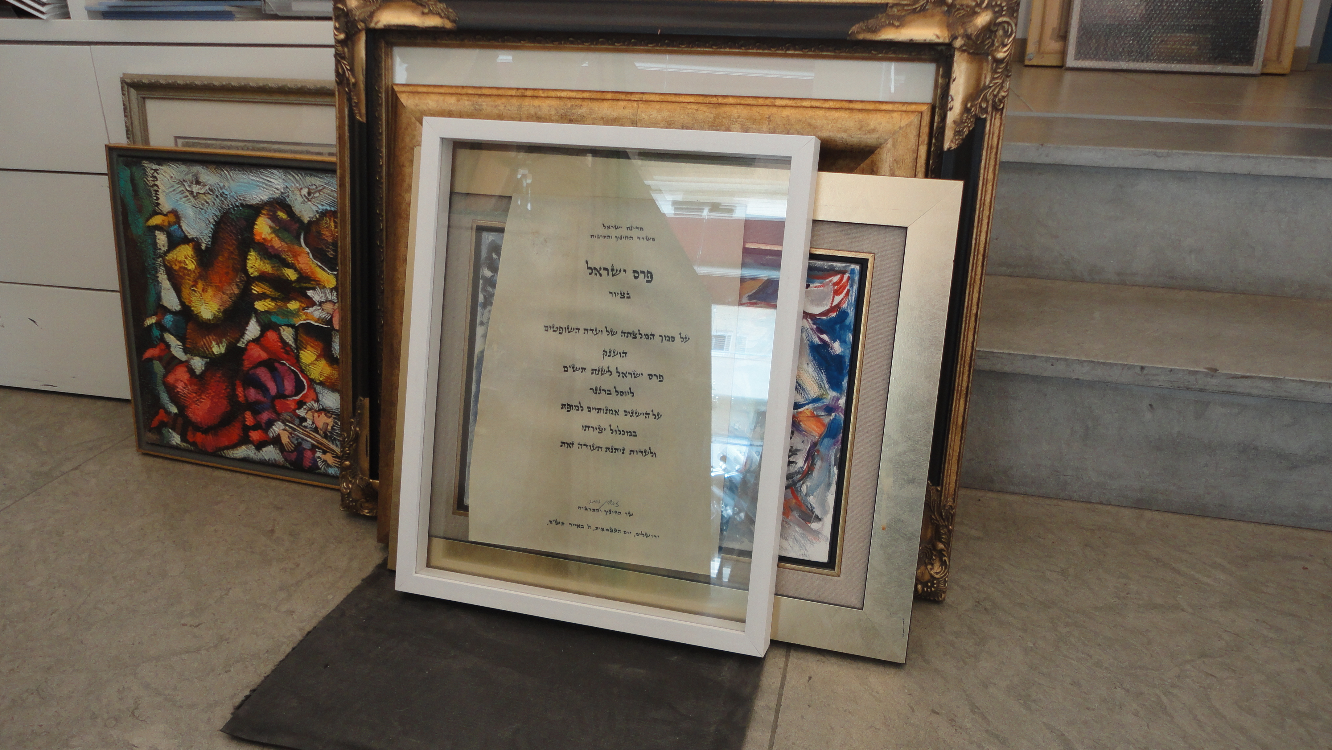 תעודת פרס ישראל של יוסל ברגנר בגלריה דן, תל אביב-יפו, 2014